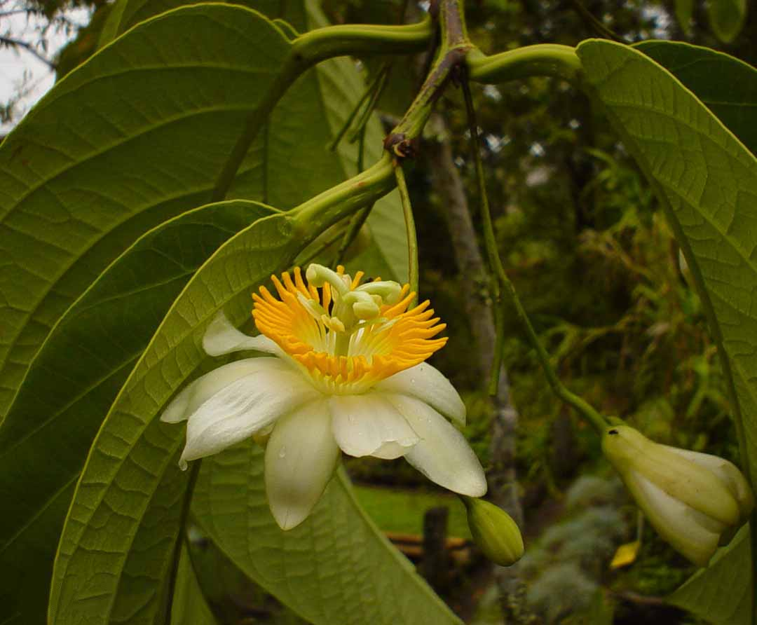 Passiflora arborea Spreng (Subgénero Astrophea), fotografía tomada en el Jardín Botánico de la Universidad de Caldas en Manizales (Colombia)